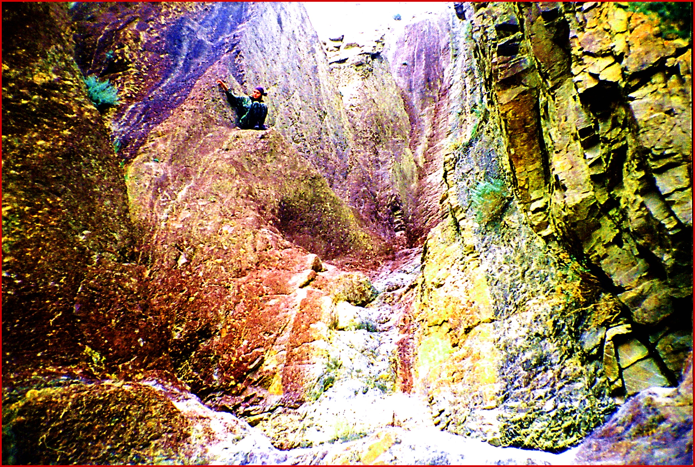 «Сухие водопады» чаганского скэбленда, нижняя часть долины р. Чаган-Узан, Юго-Восточный Алтай